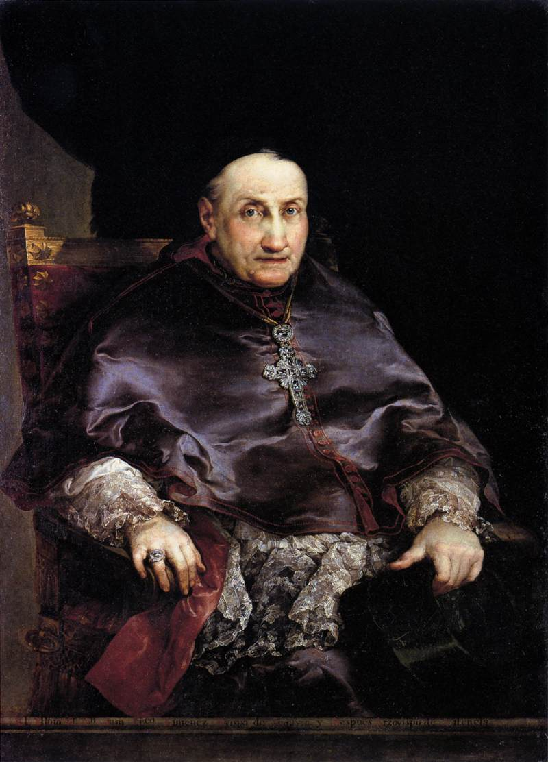 Retrato del eclesiástico español Juan Francisco Jiménez del Río (1736-1800), que llegó a ser obispo de Segovia y arzobispo de Valencia.